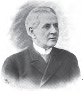 А.Ф. Федотов (1841 - 1895) - русский артист